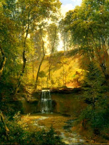 Gemälde von Johann Jakob Ulrich